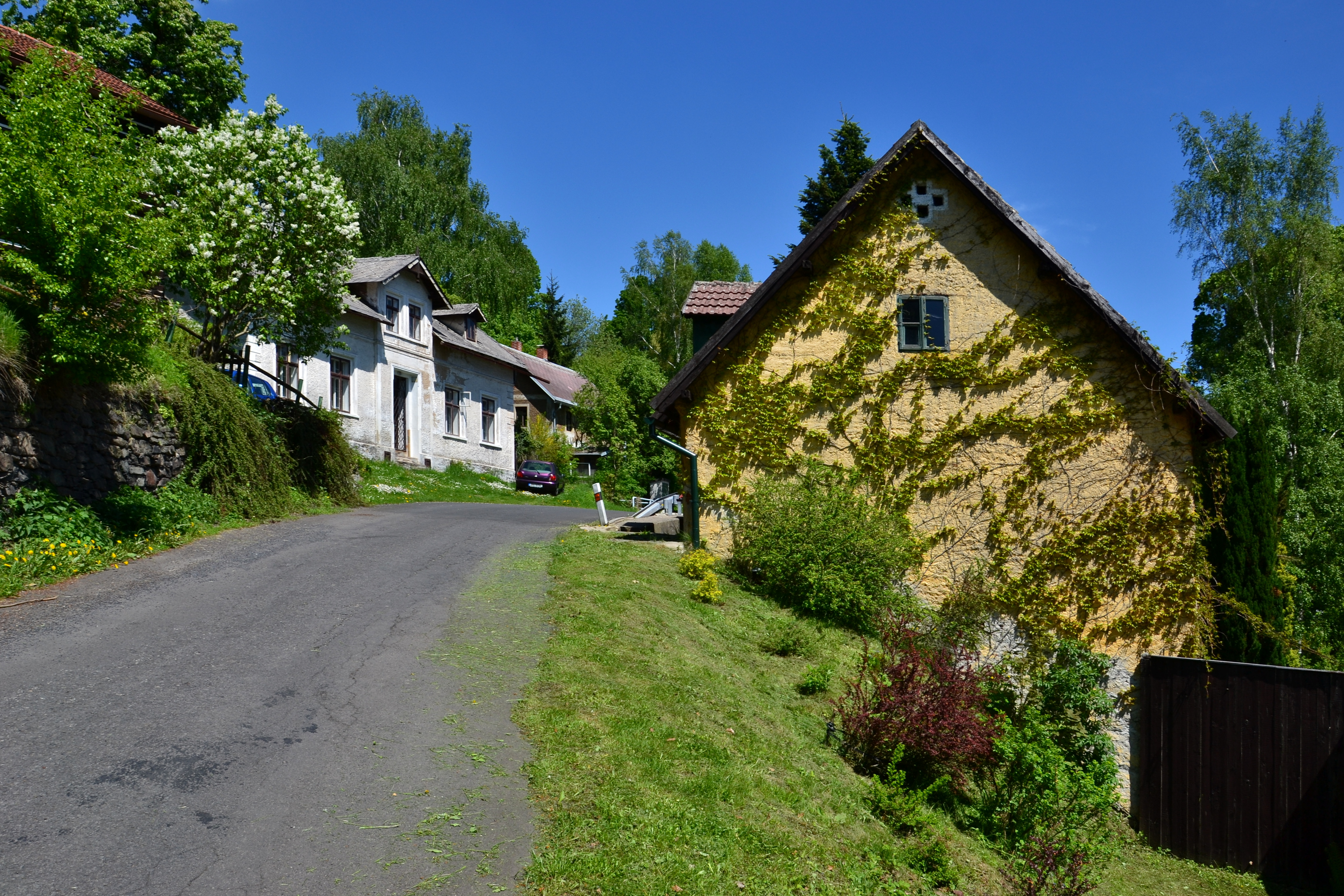 Malý Hrzín